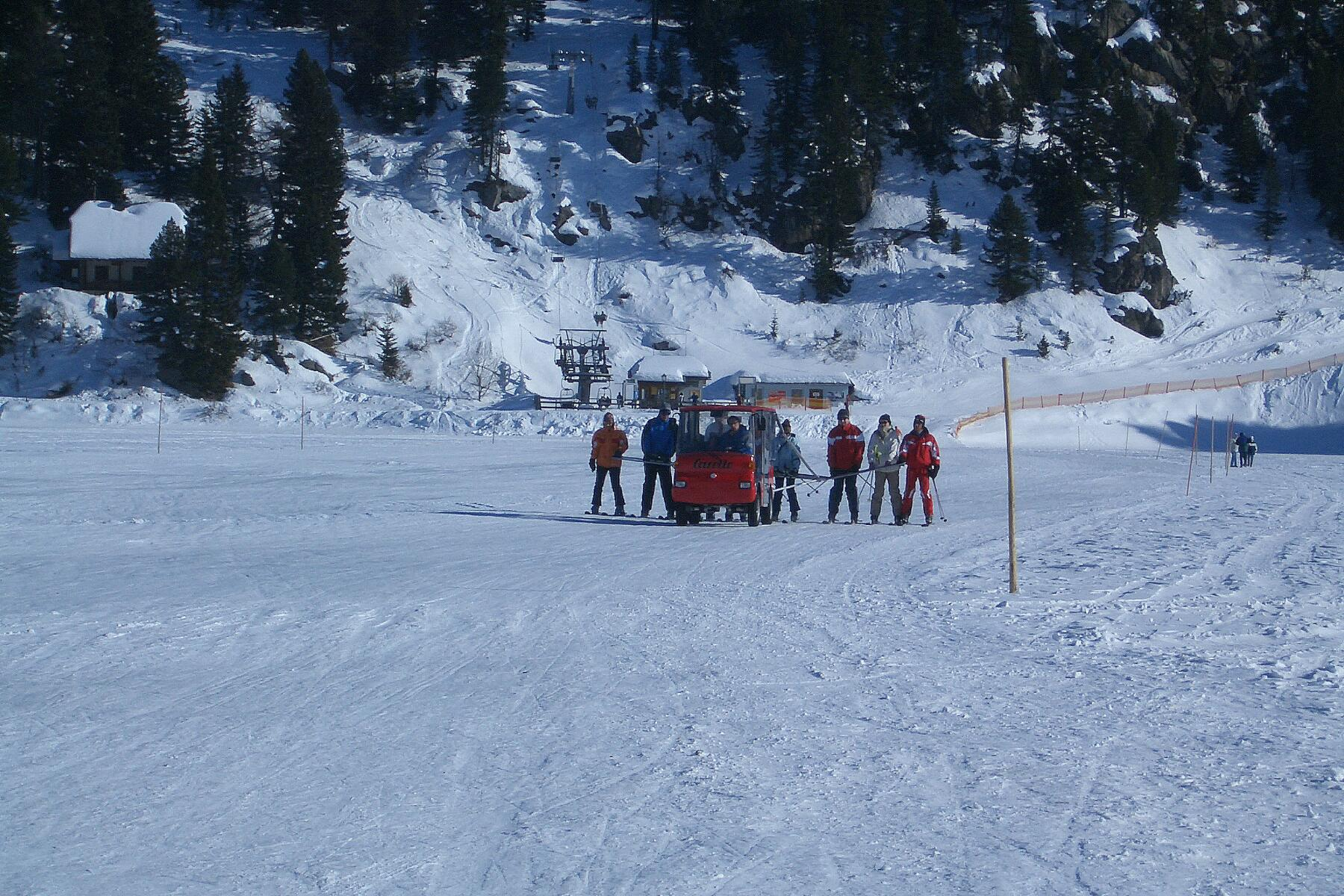 Turracher Höhe: Skitaxi befördert Skiäufer über den Turracher See